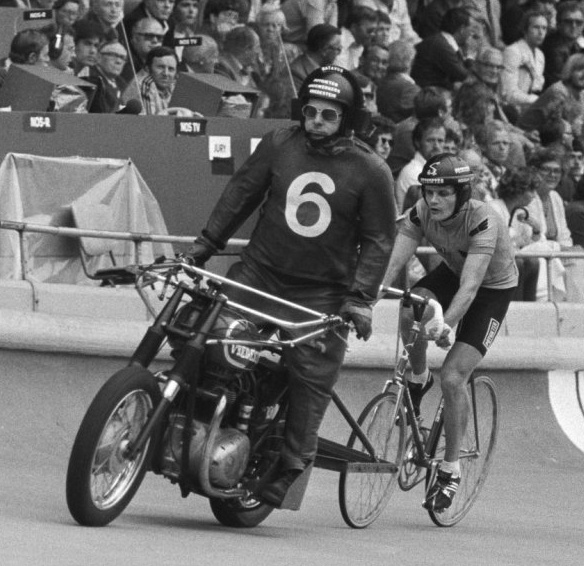 Martin Venix and his pacer Noppie Koch (left) at the World Championship 1979